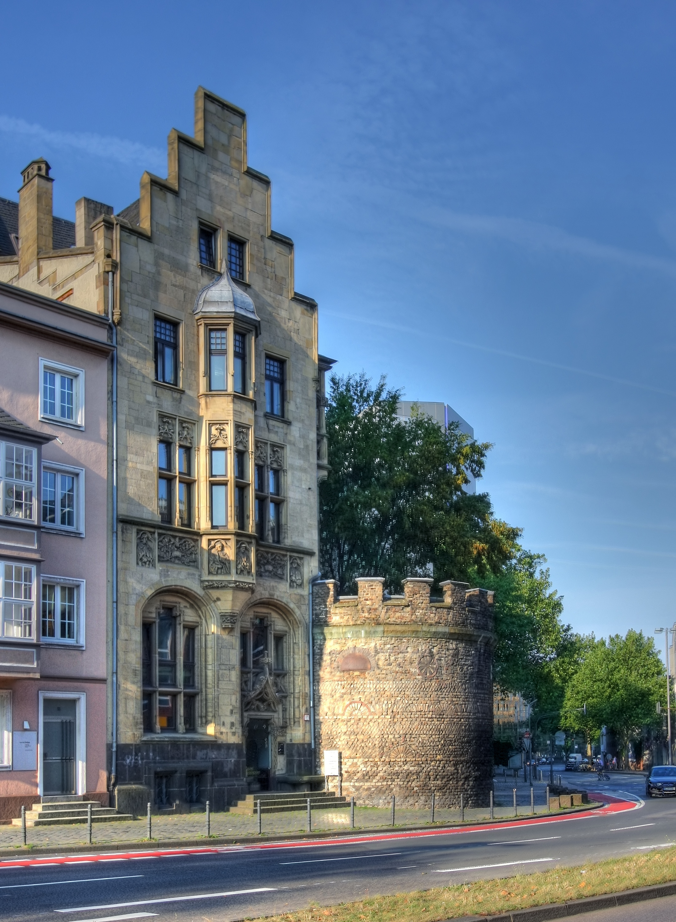 Römerturm an der Zeughausstraße, Köln. Links daneben ein neugotisches Wohnhaus: Architekt: Carl Moritz, Baujahr 1898. Wohnhaus: This is a photograph of an architectural monument. Römerturm: This is a photograph of an architectural monument.